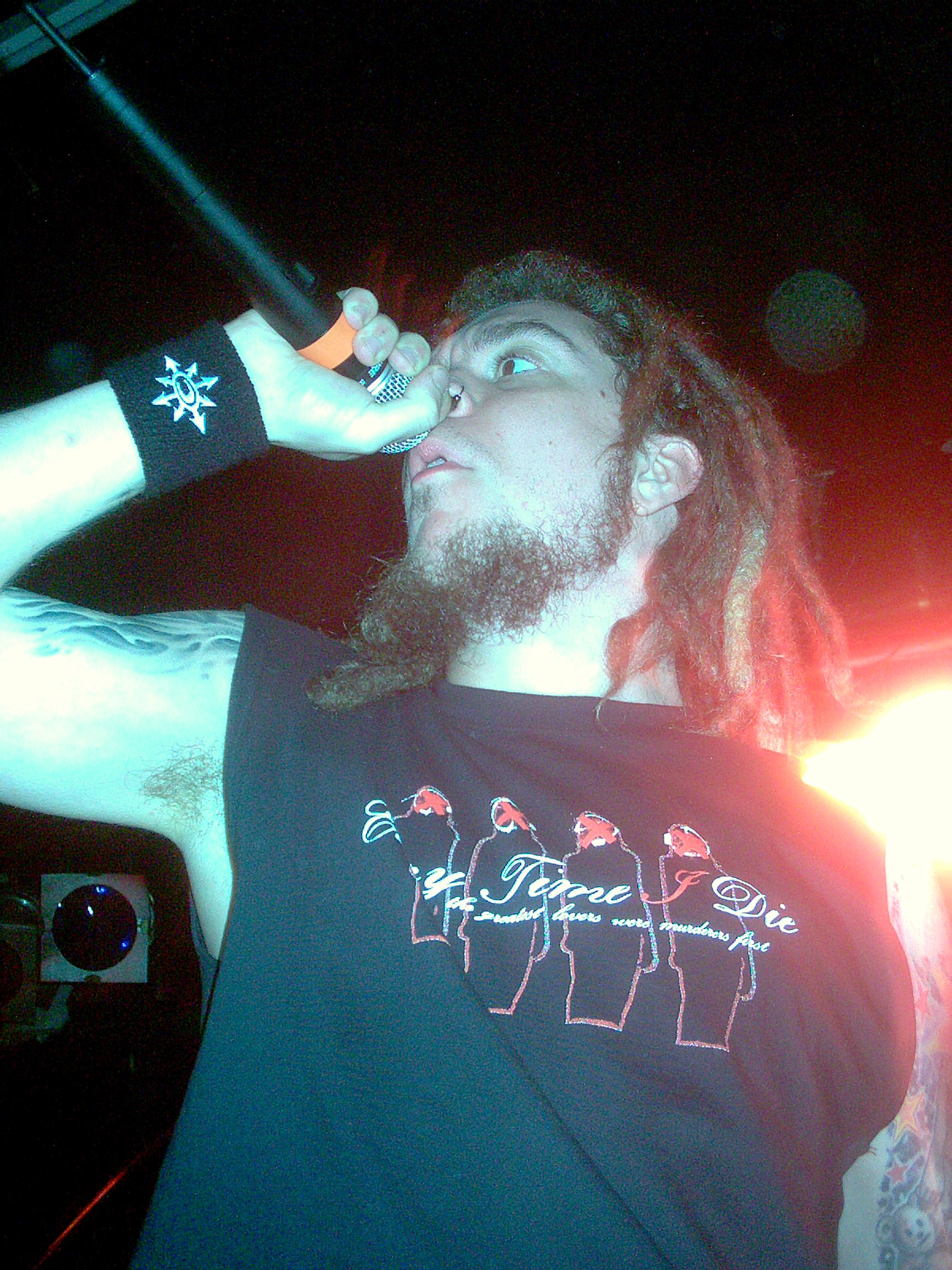 Mark Hunter during concert of Chimaira in Berlin, 24 February 2004